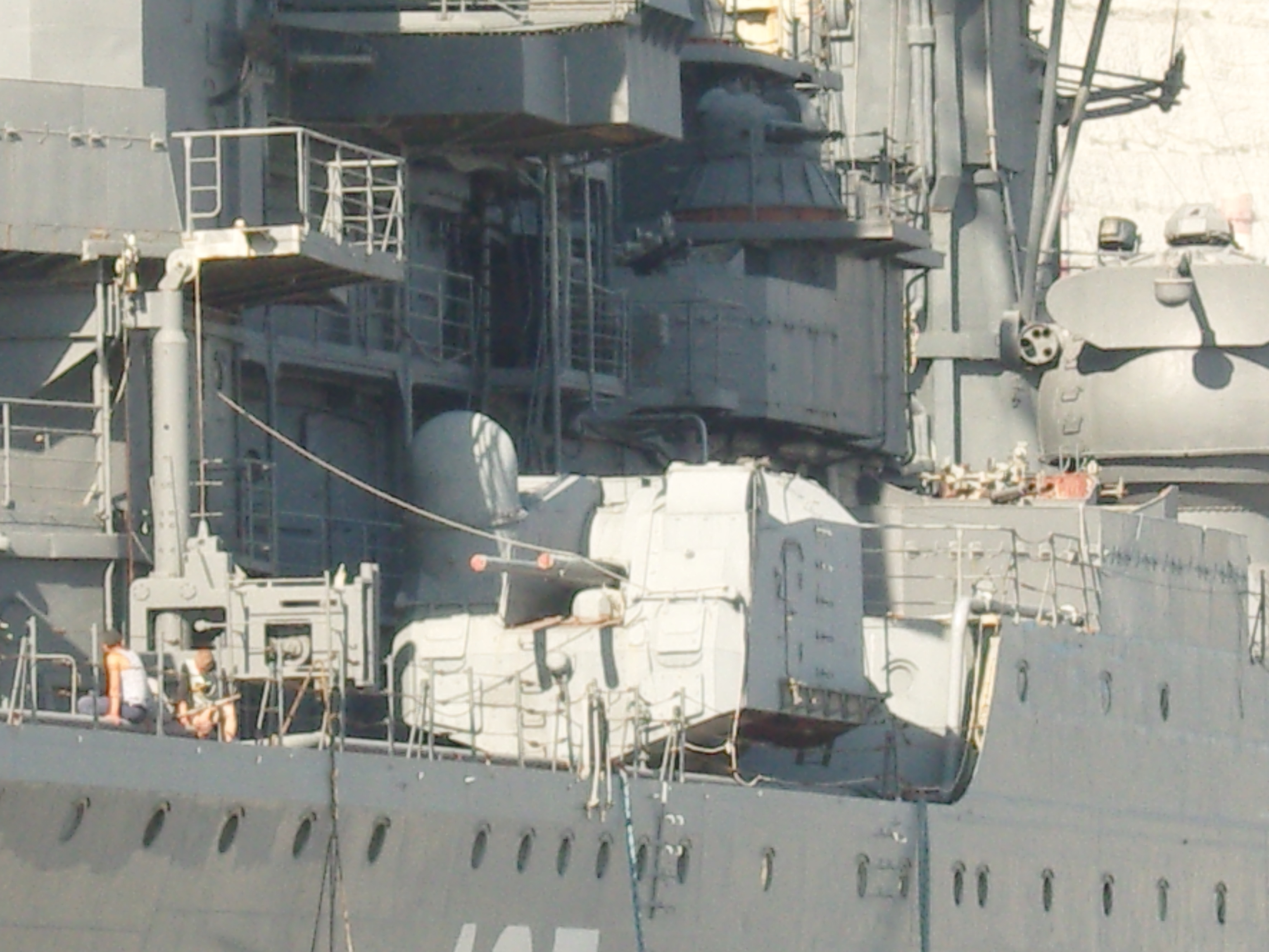 Спаренное 100-мм орудие универсальной артиллерии СМ-5-1